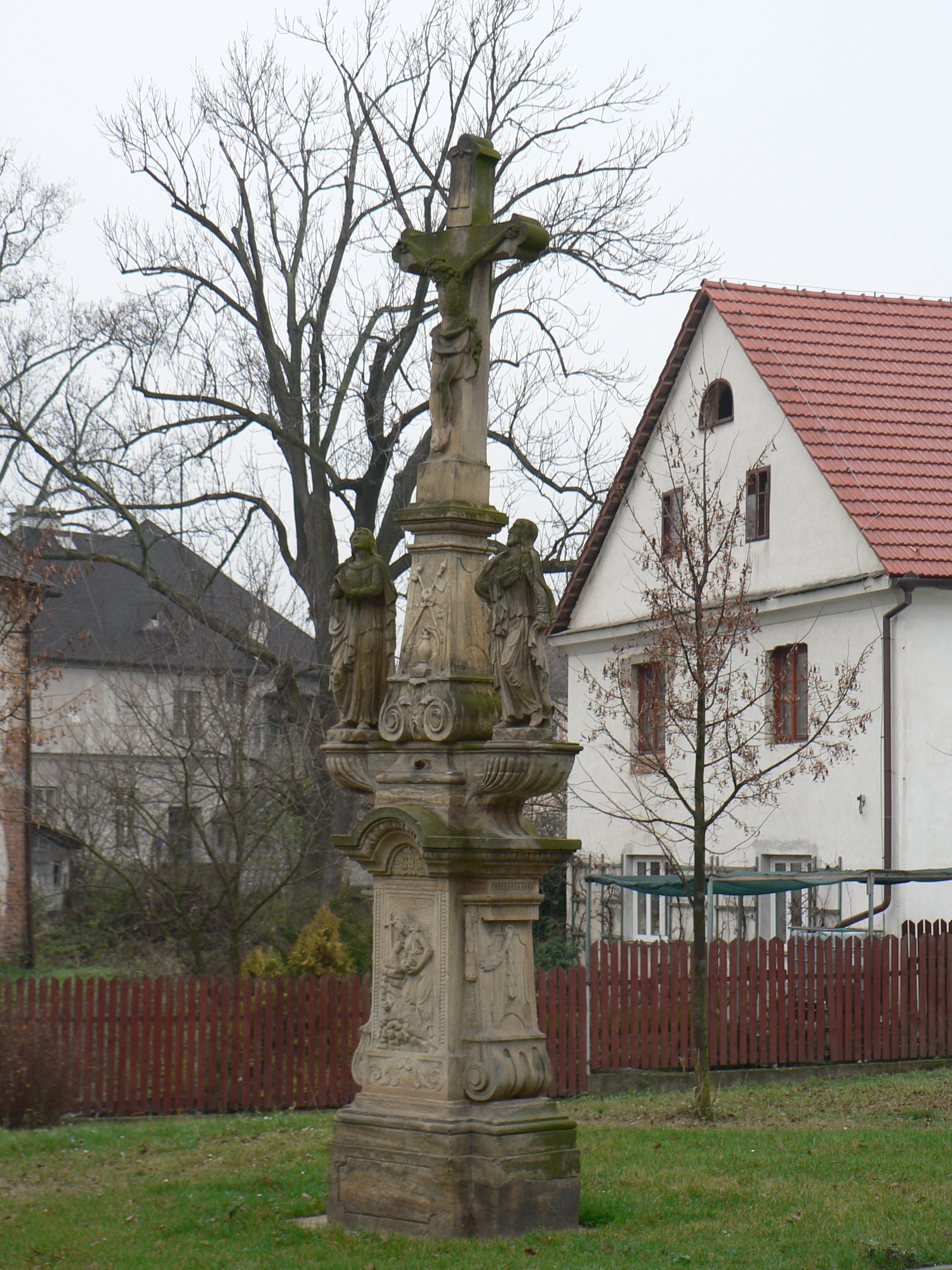 Libina, kříž na náměstí (2. čtvrtina 19. století)